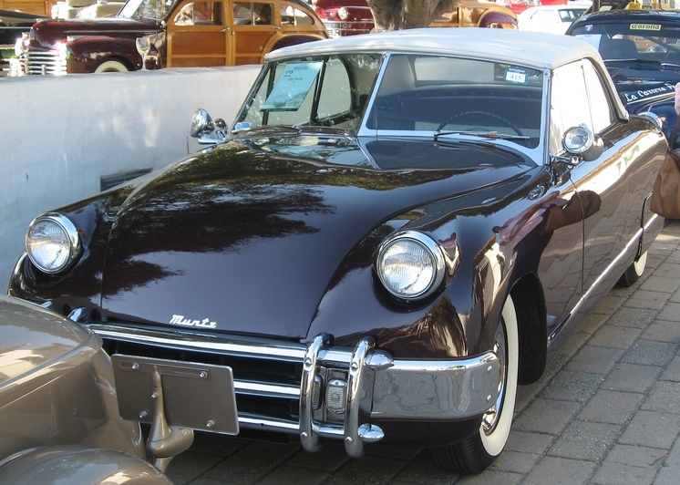 1953 Muntz Jet sports car